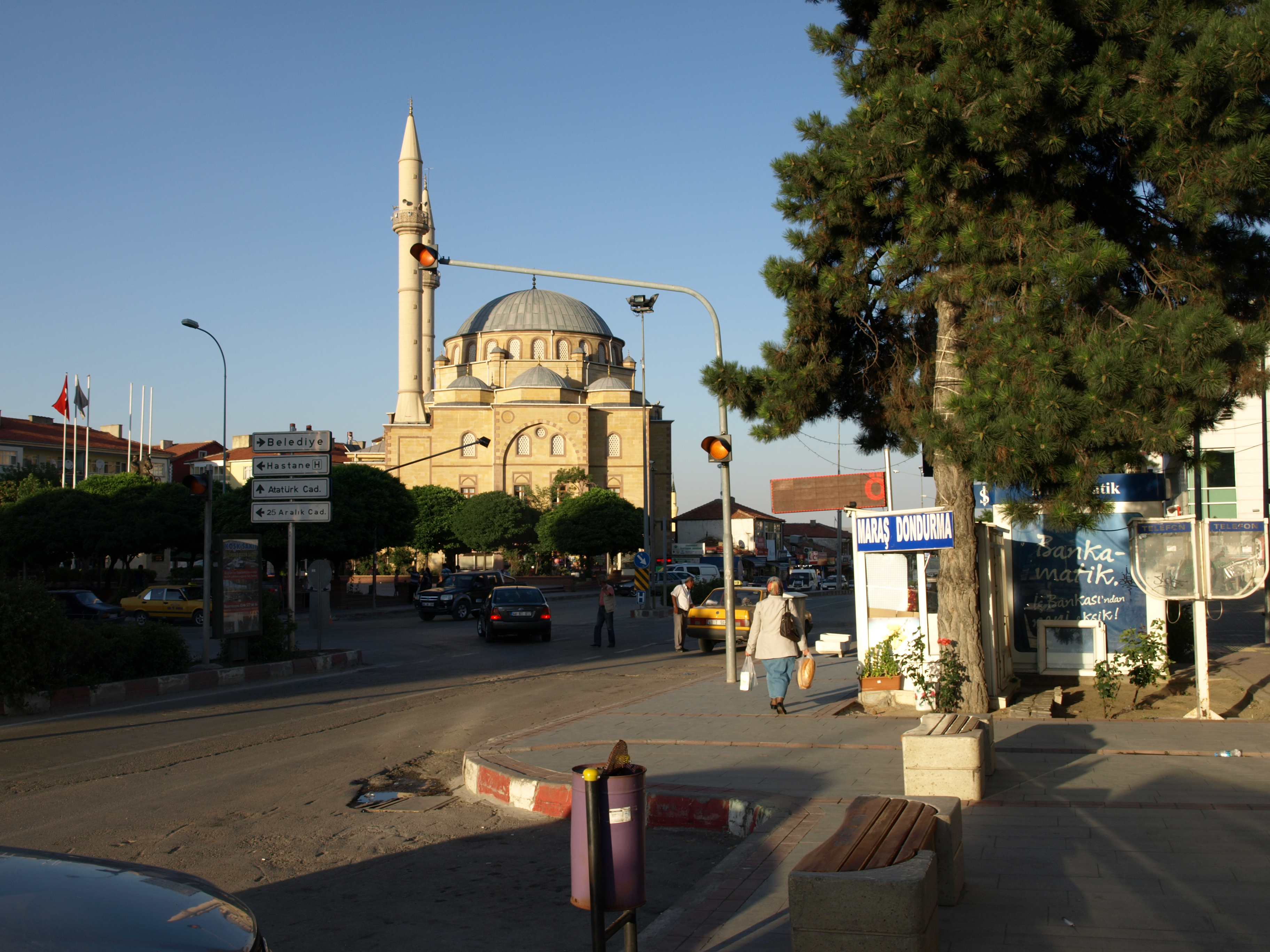 Der Platz im Zentrum von Kaman, Provinz Kırşehir/Türkei